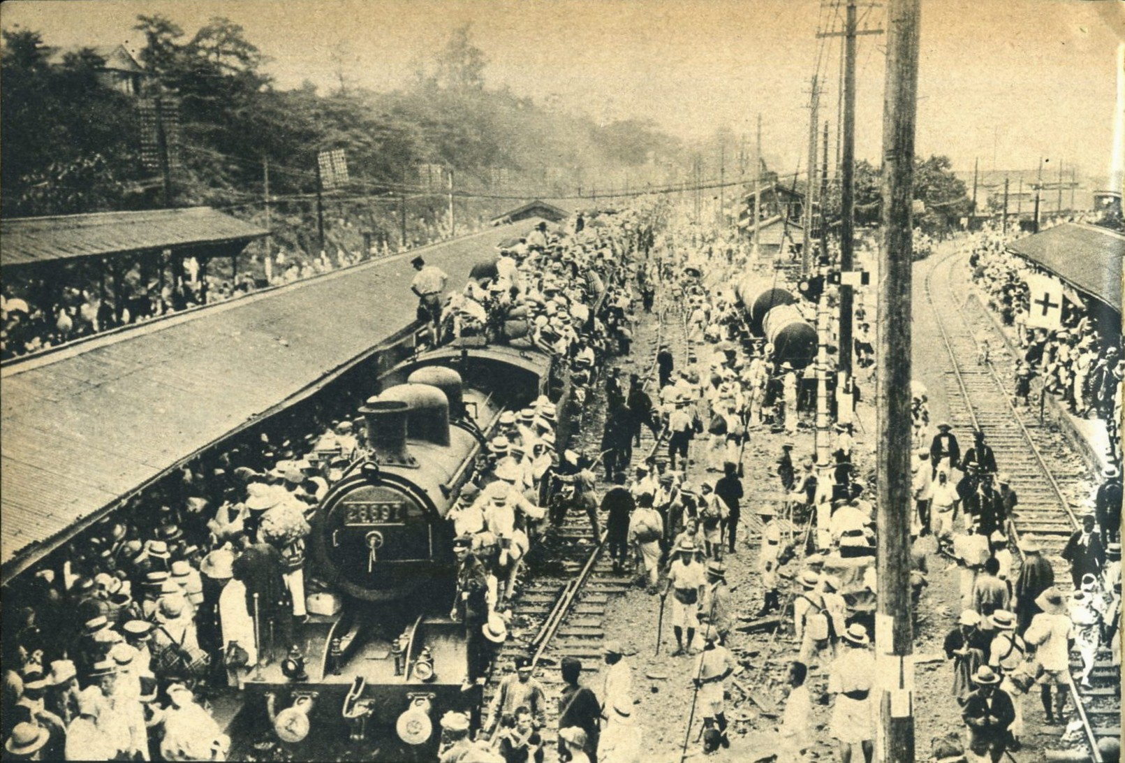 関東大震災の際、日暮里駅から地方へ避難する人々。毎日フォトバンクの「関東大震災線路上まで溢れた避難民日暮里駅」という写真ではこの写真より右が見える。 「日本国有鉄道百年写真史」などには、同時に撮られた別の写真が掲載されている。「ナショナルジオグラフィックが見た日本の100年」(2003年、日経ナショナルジオグラフィック社)にはまた別の写真が見開きで掲載されていて、機関車に笑顔の人も居る事が分かる。蒸気機関車は8620形28697。